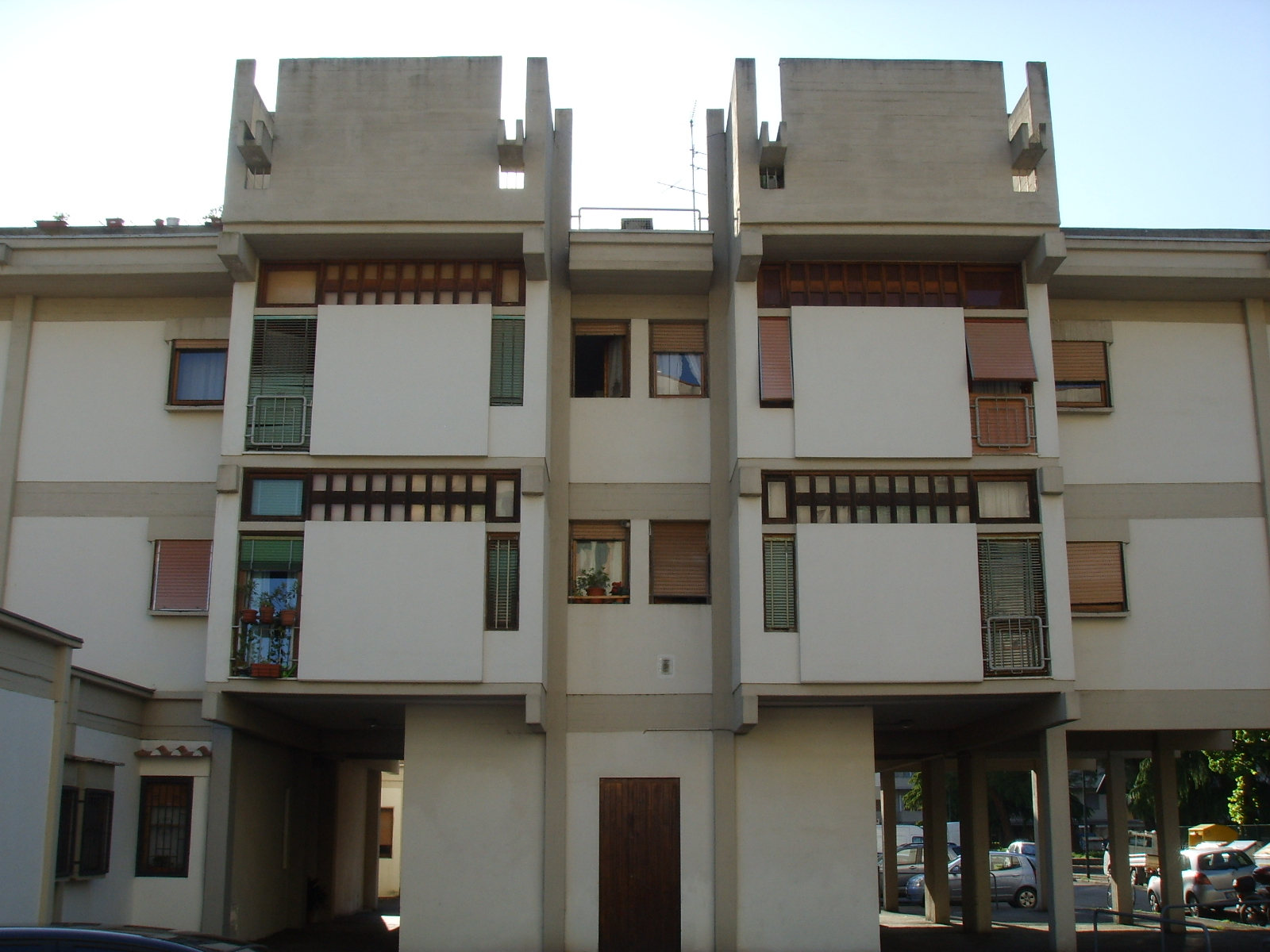 Edificio E di Sorgane 03.1